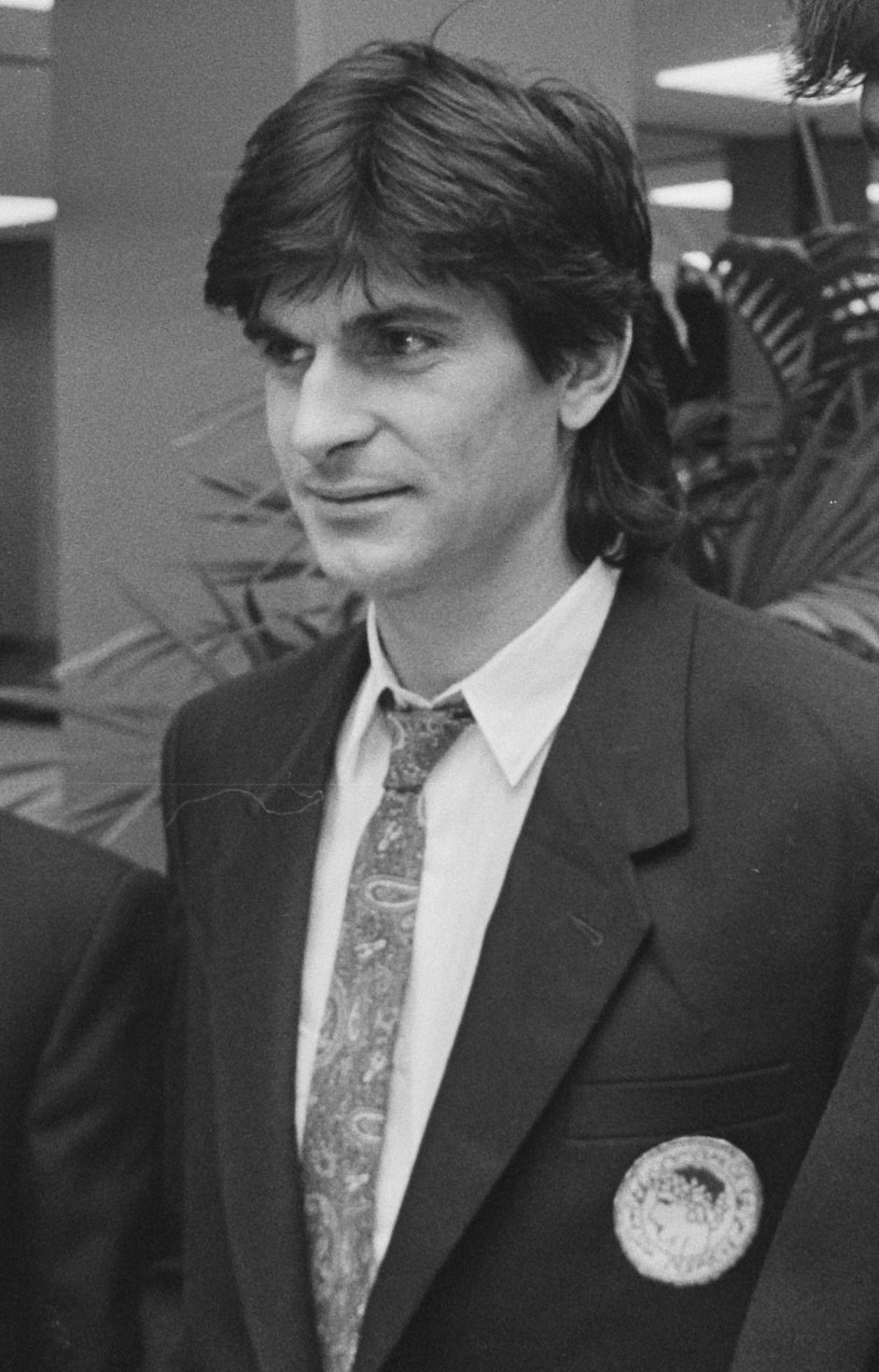 Collectie / Archief : Fotocollectie Anefo Reportage / Serie : [ onbekend ] Beschrijving : Aankomst op Schiphol van Olympiakos; vlnr: Zelelidis, Kostikos, Anastopoulos Datum : 20 oktober 1986 Trefwoorden : sport, voetballers Persoonsnaam : Anastopoulos Instellingsnaam : Olympiakos Piraeus Fotograaf : Croes, Rob C. / Anefo Auteursrechthebbende : Nationaal Archief Materiaalsoort : Negatief (zwart/wit) Nummer archiefinventaris : bekijk toegang 2.24.01.05 Bestanddeelnummer : 933-7922